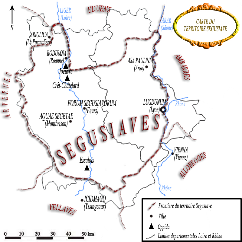 Carte du territoire Ségusiave